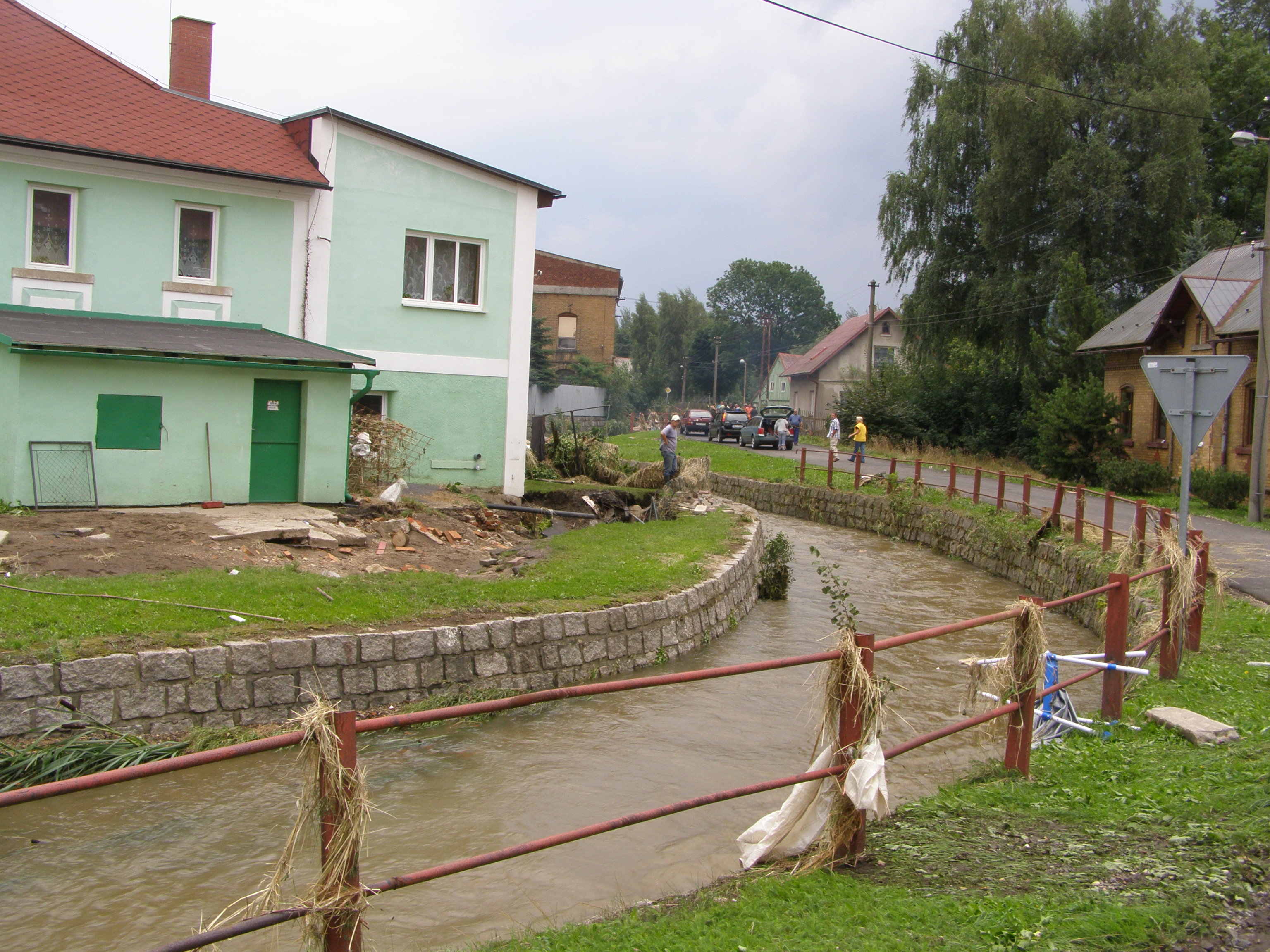 Dětřichov, potok Oleška první den po povodni v srpnu 2010